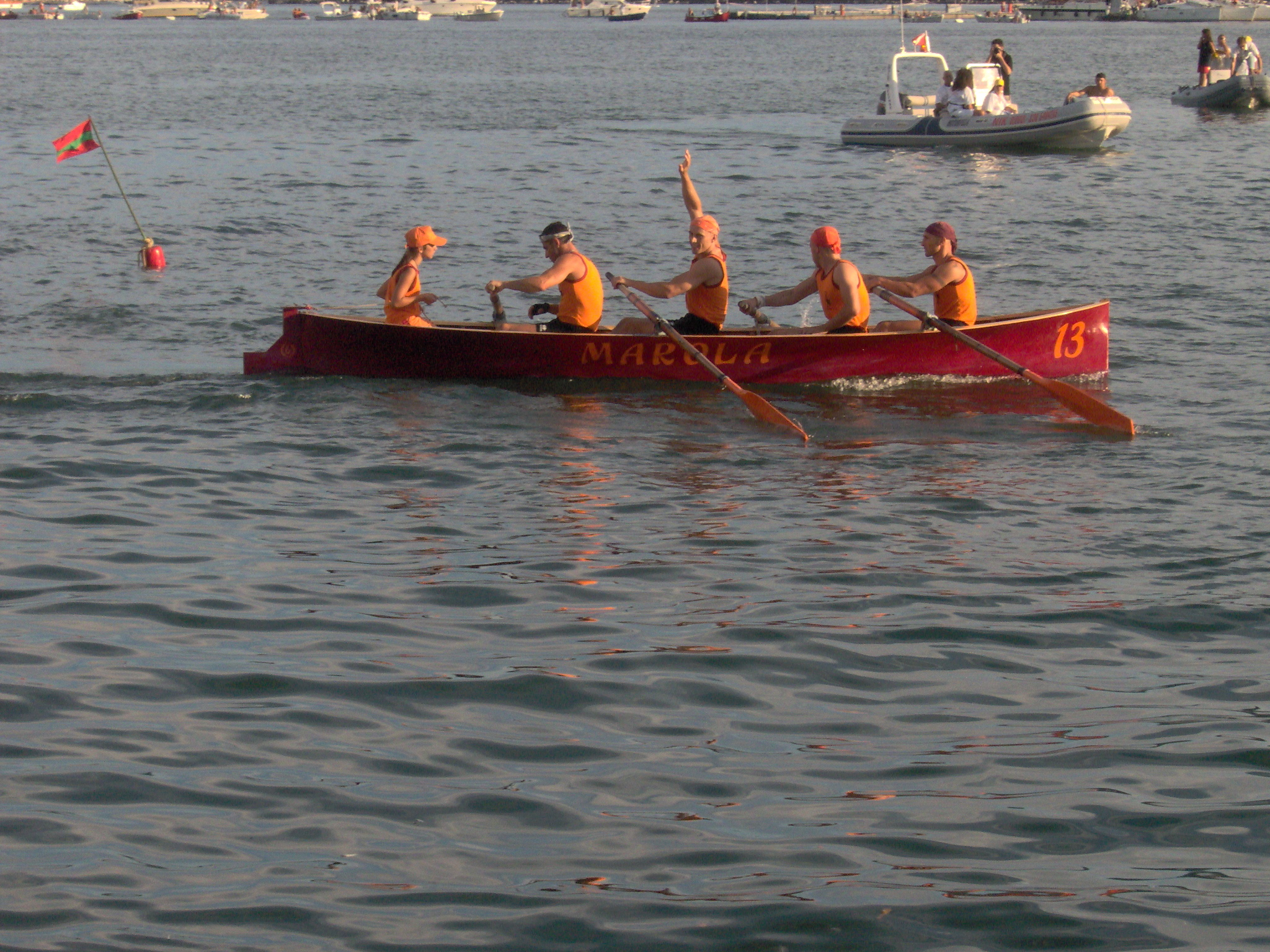 La borgata di Marola durante l'81° Palio del Golfo